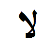 Das Lam-Alif, eine arabische Ligatur, in isolierter Form.